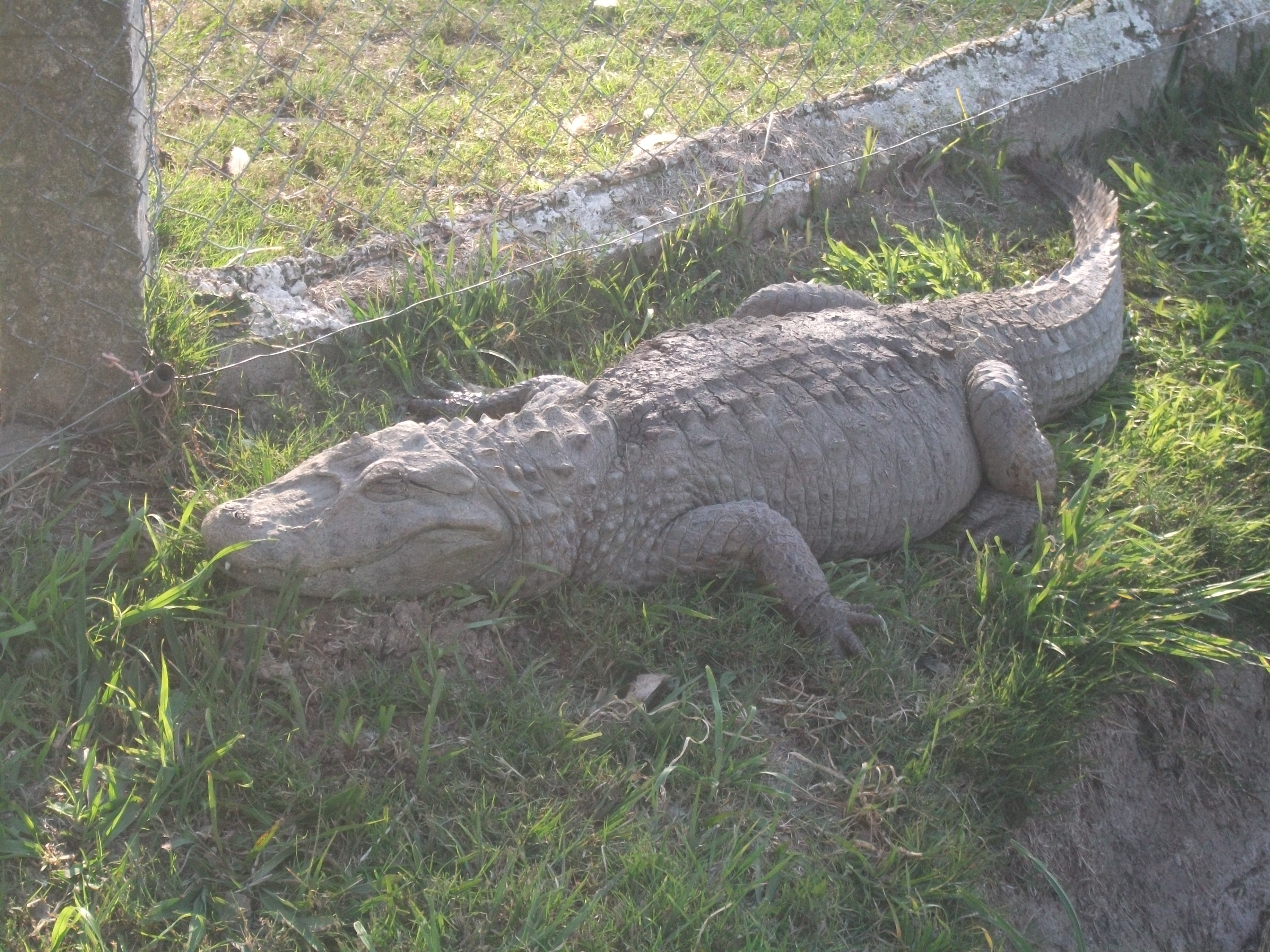 Este Caimán se fotografió en la reserva de fauna de Carmelo, Uruguay.